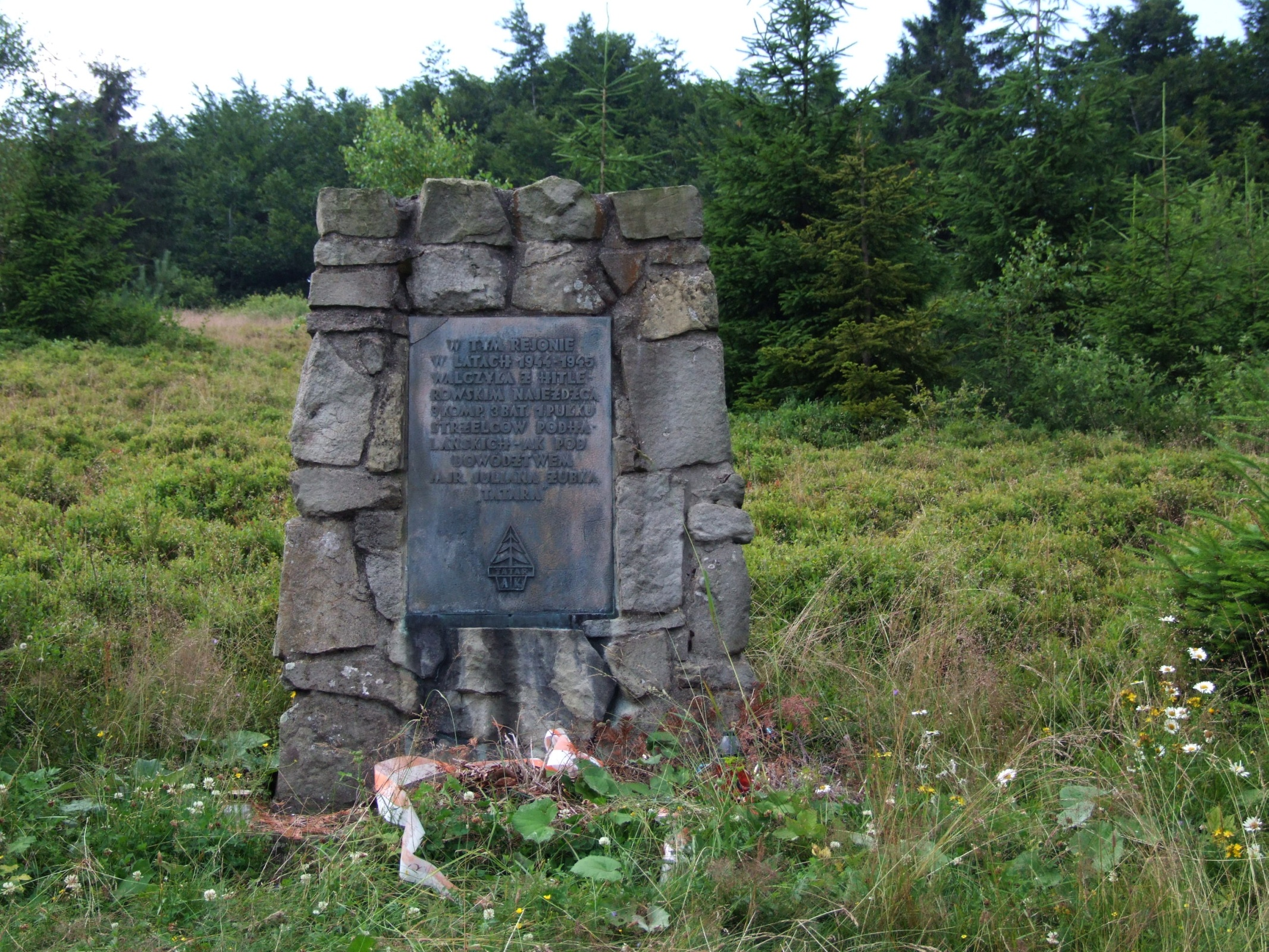 Pomnik partyzantów AK na Łabowskiej Hali